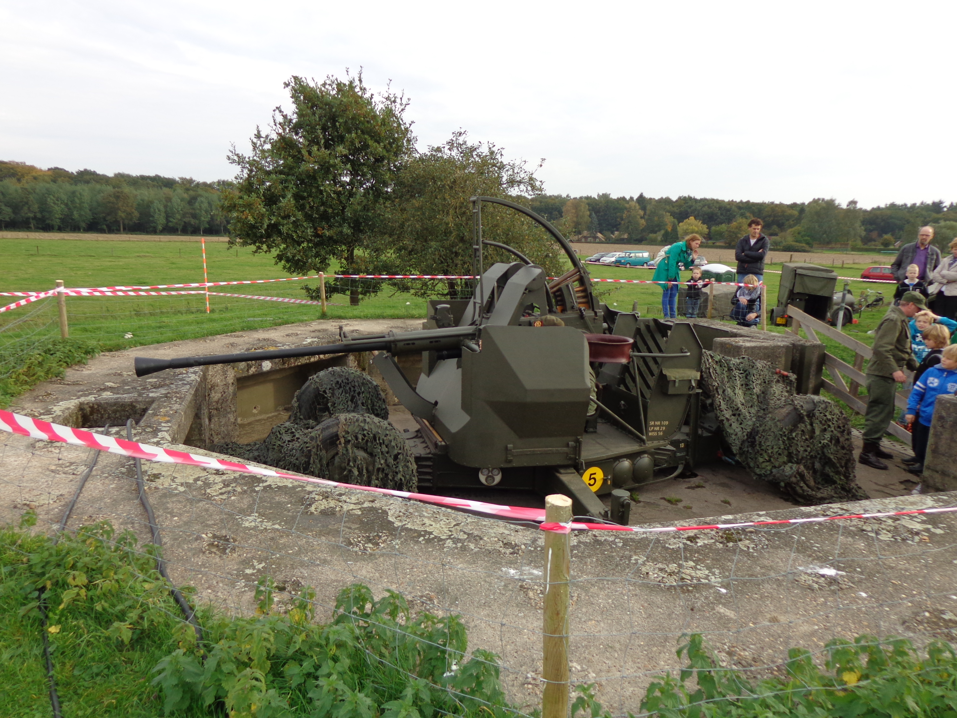 Bofors kazemat van de IJssellinie te Olst. Demonstratie tijdens Bunkerdag 2013